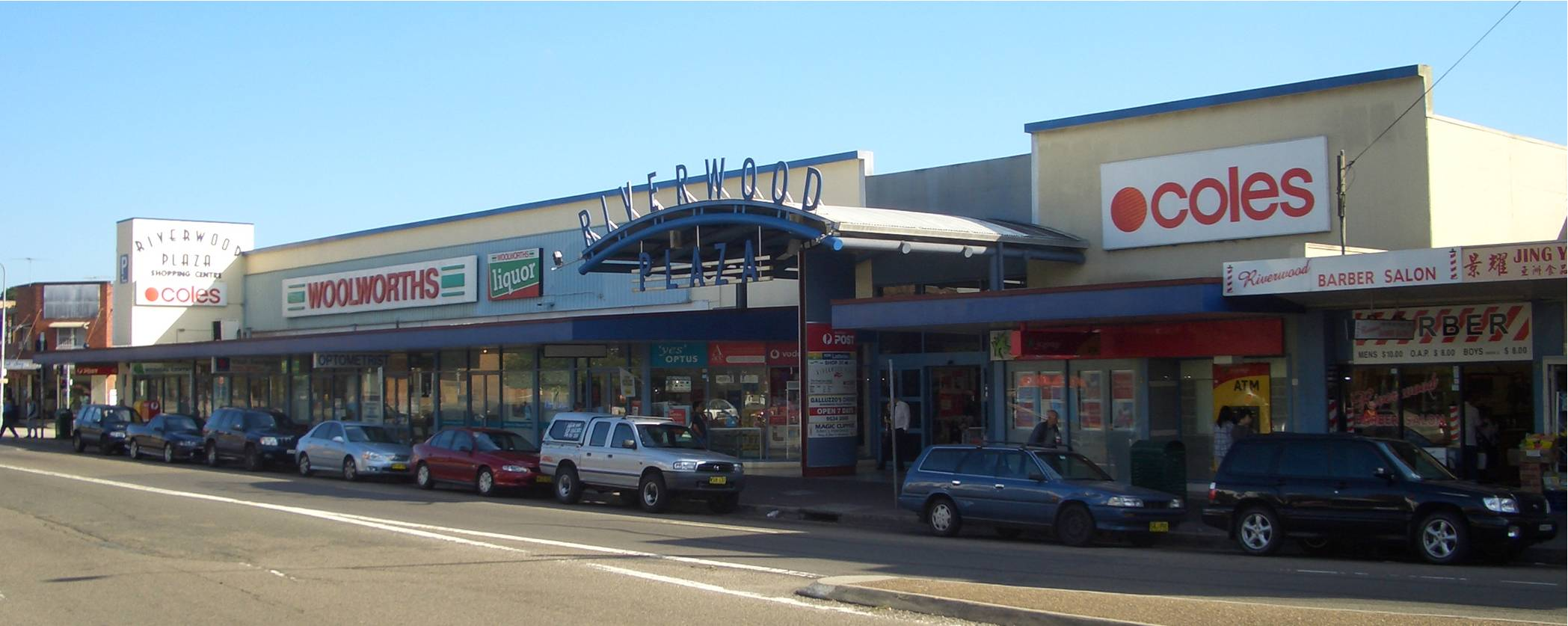 Riverwood_Plaza